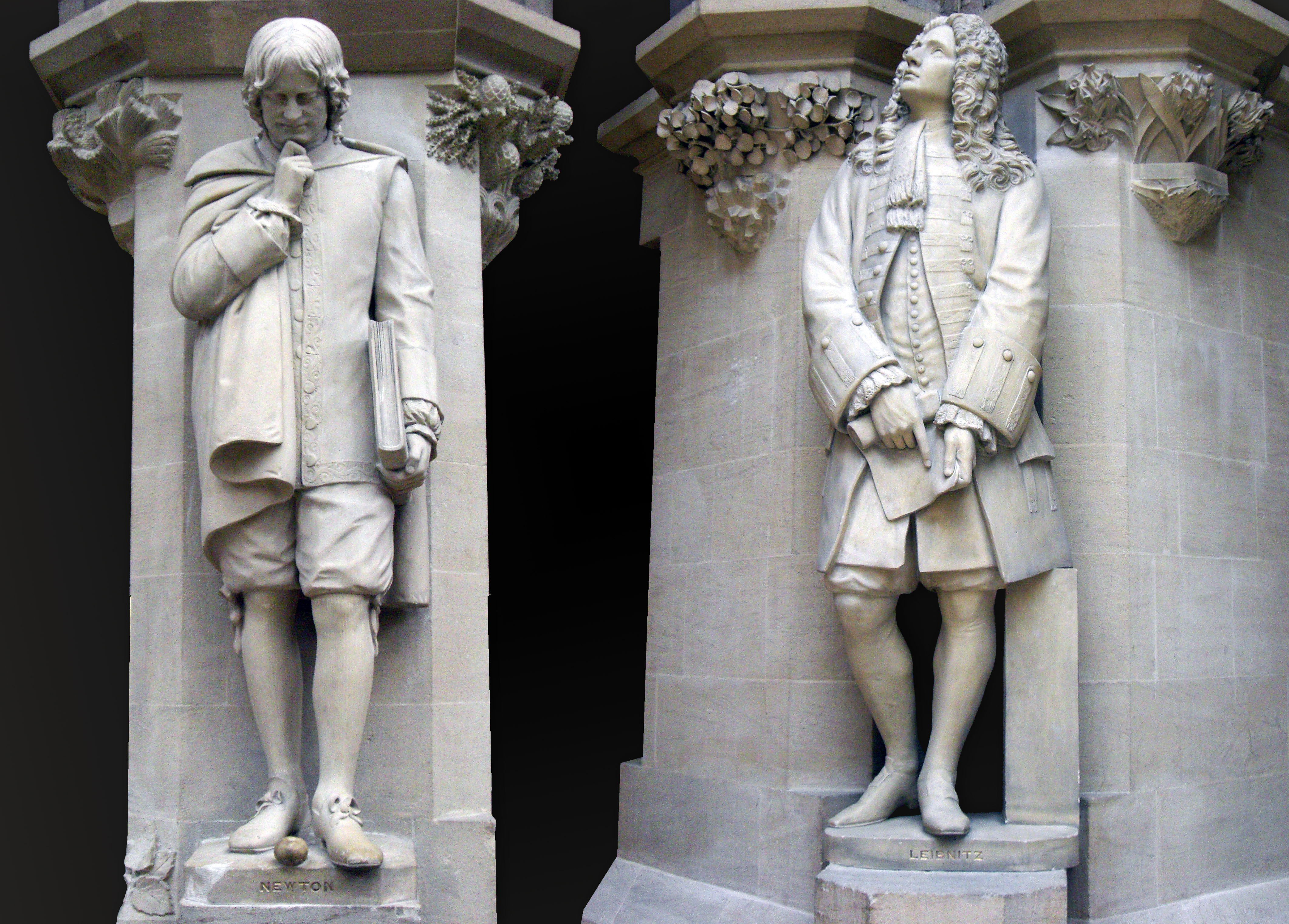 Статуи Ньютона и Лейбница из Оксфордского университетского музея национальной истории. Коллаж.